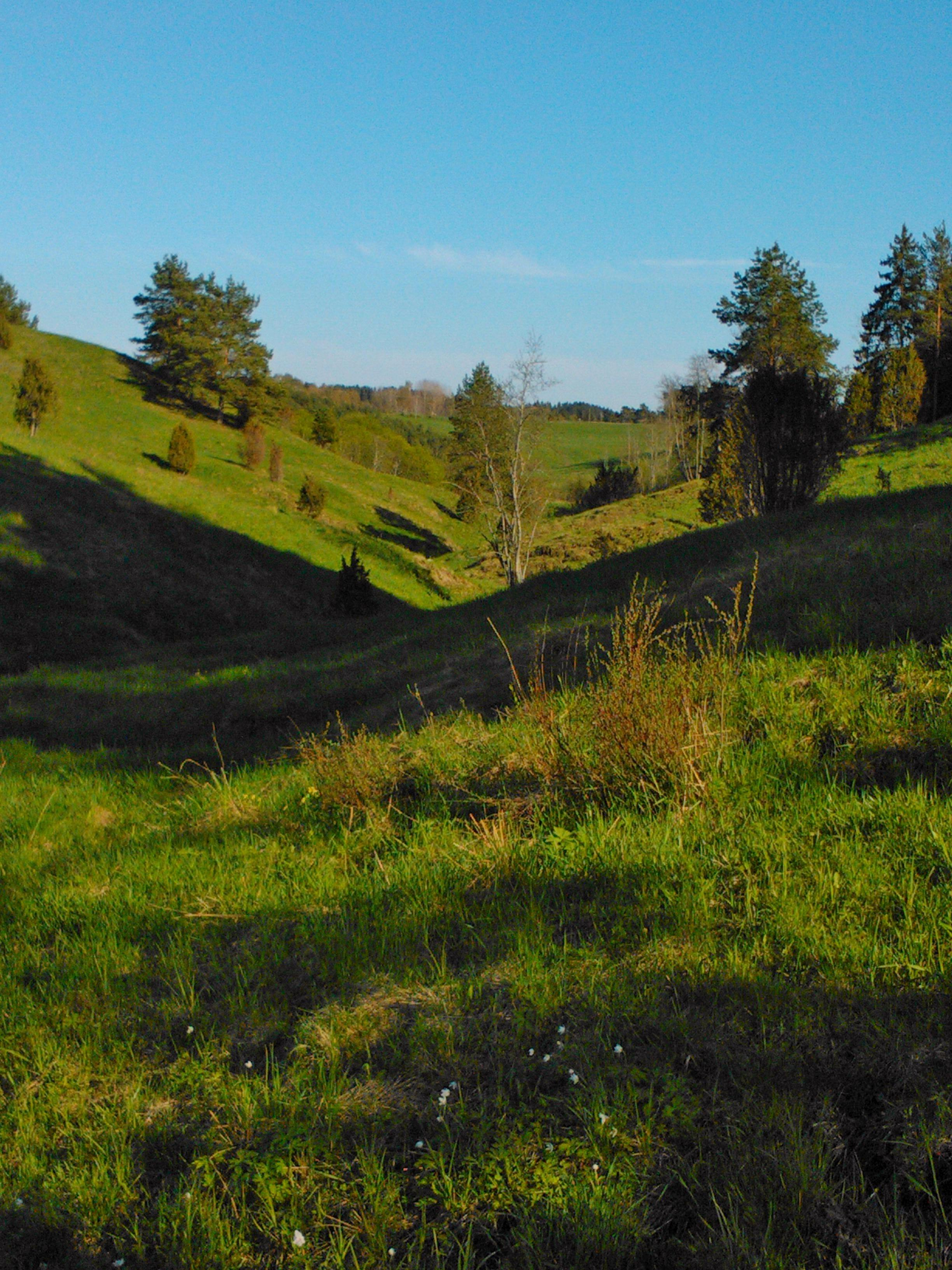 Maisemakuva